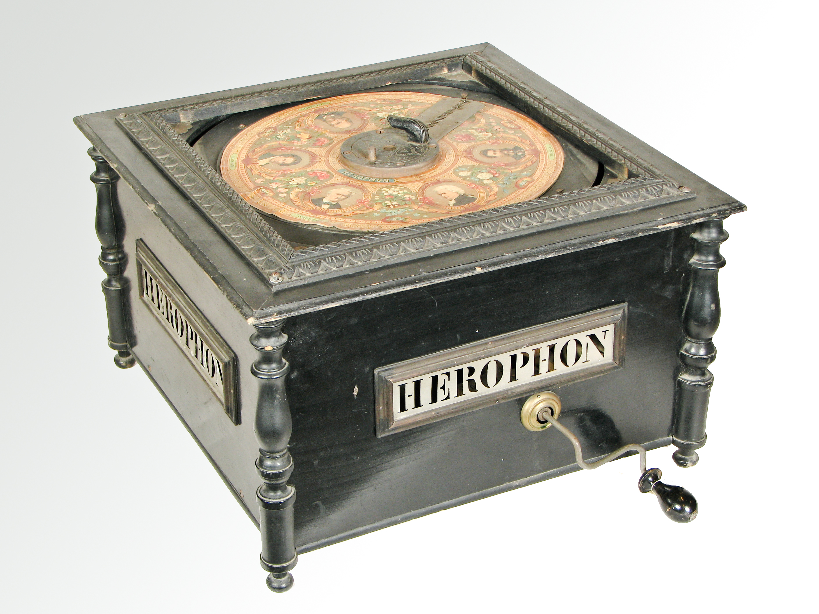 Organette. Foto: Dan Johansson. Ingår i Musik- och teatermuseets instrumentsamling.